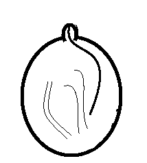 Tubo acomodandose